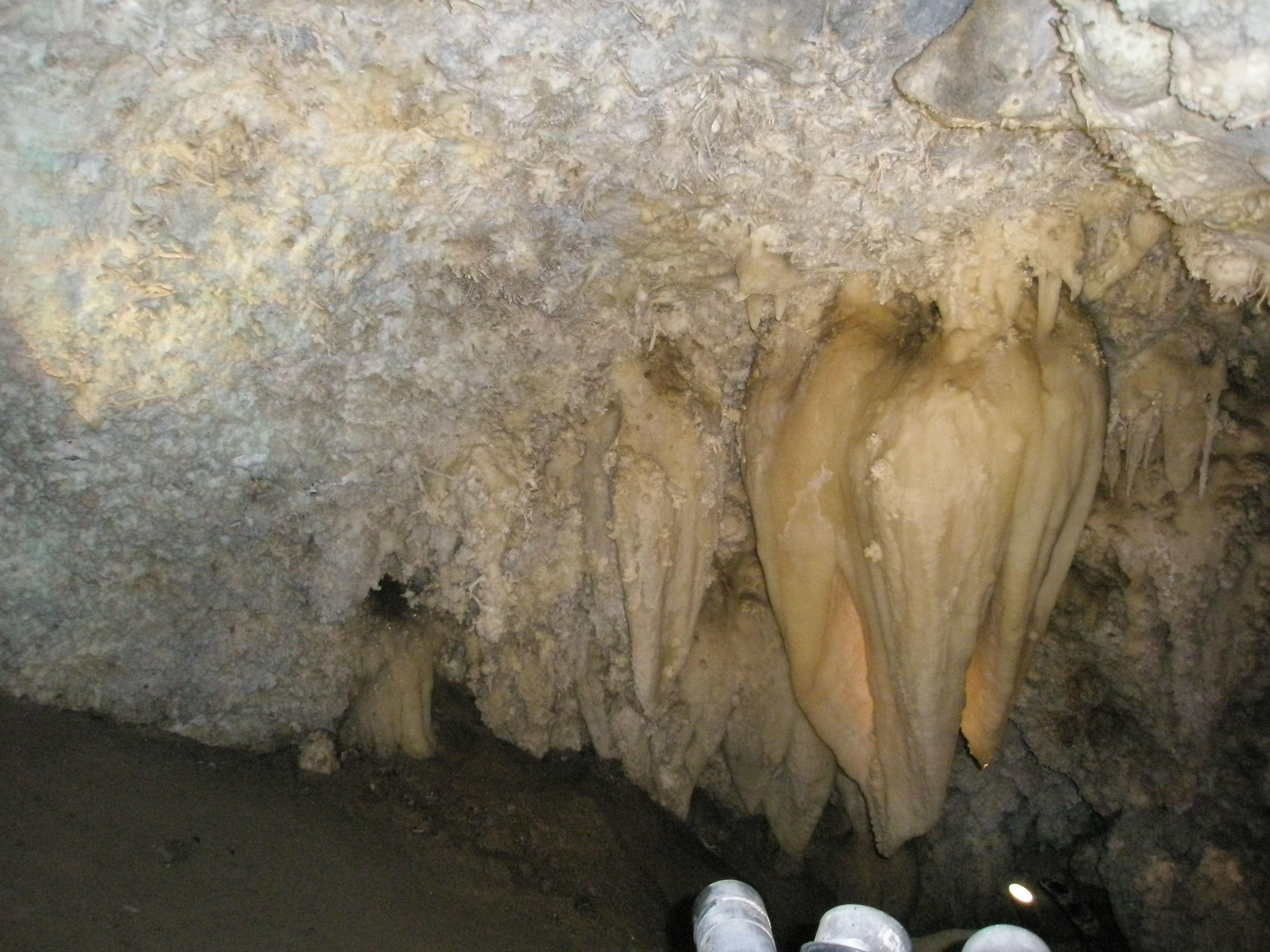 Timpanogos Cave